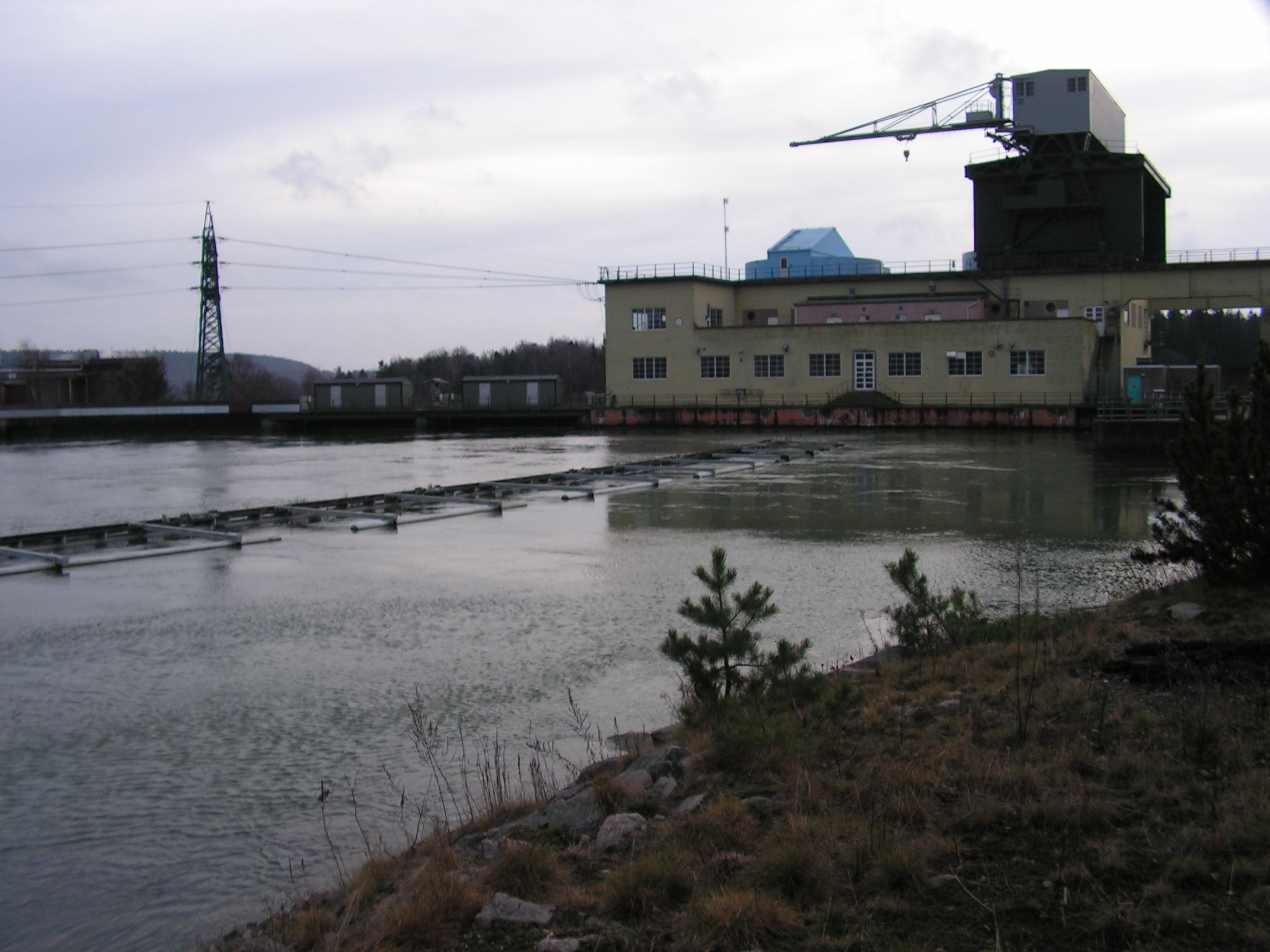 Vattenkraftverket i Vargön, Sweden.